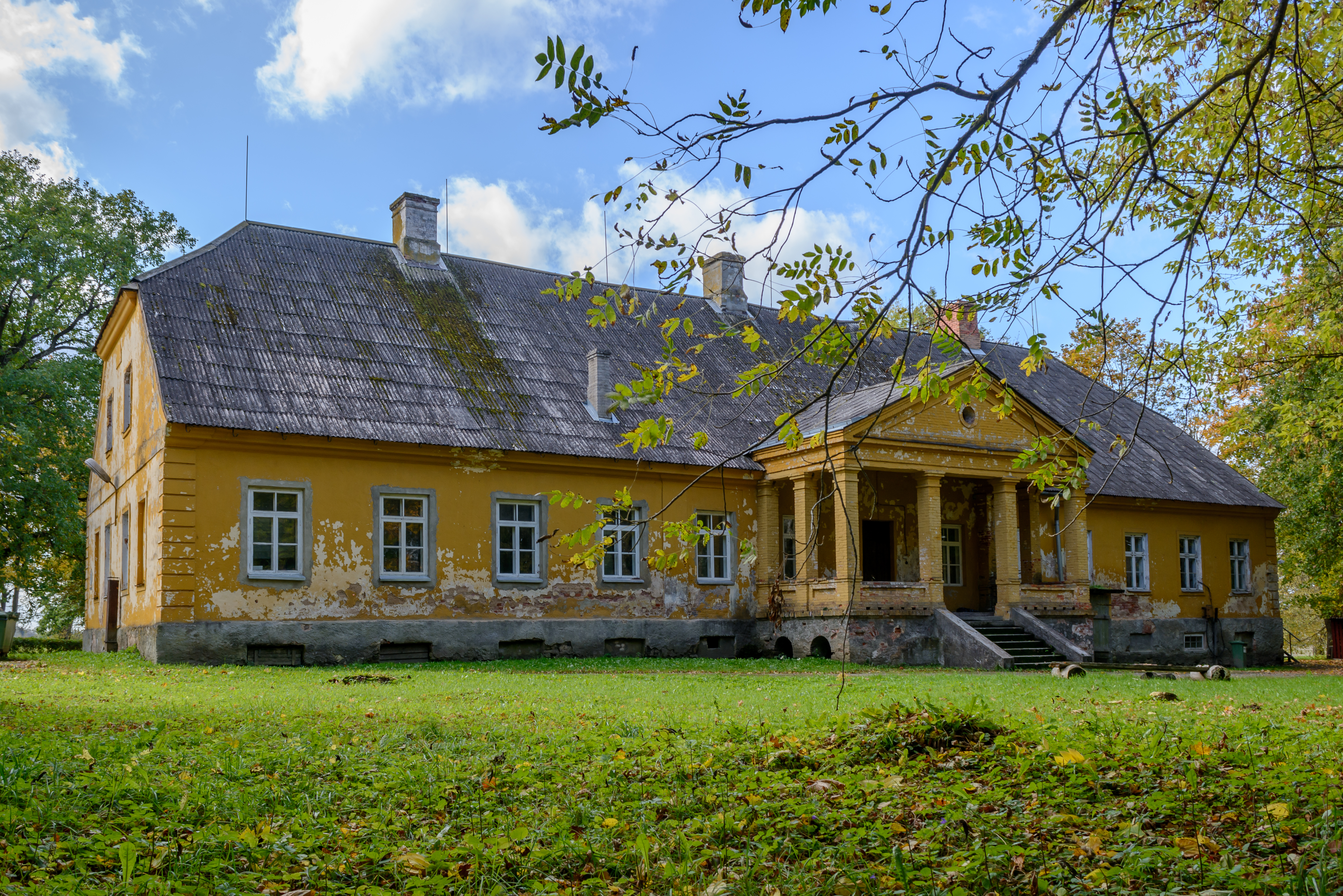 Põlgaste mõisa peahoone